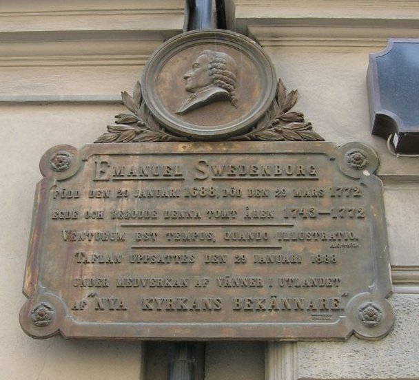 Hornsgatan 43. Emanuel Swedenborg was born in this block. Södermalm, Stockholm, Sweden. Emanuel Swedenborg född den 29 januari 1688, död den 29 mars 1772 egde och bebodde denna tomt åren 1743-1772. Venturum est tempus quando illustrato Taflan uppsattes den 29 januari 1888 under medverkan af vänner i utlandet af NYA KYRKANS BEKÄNNARE